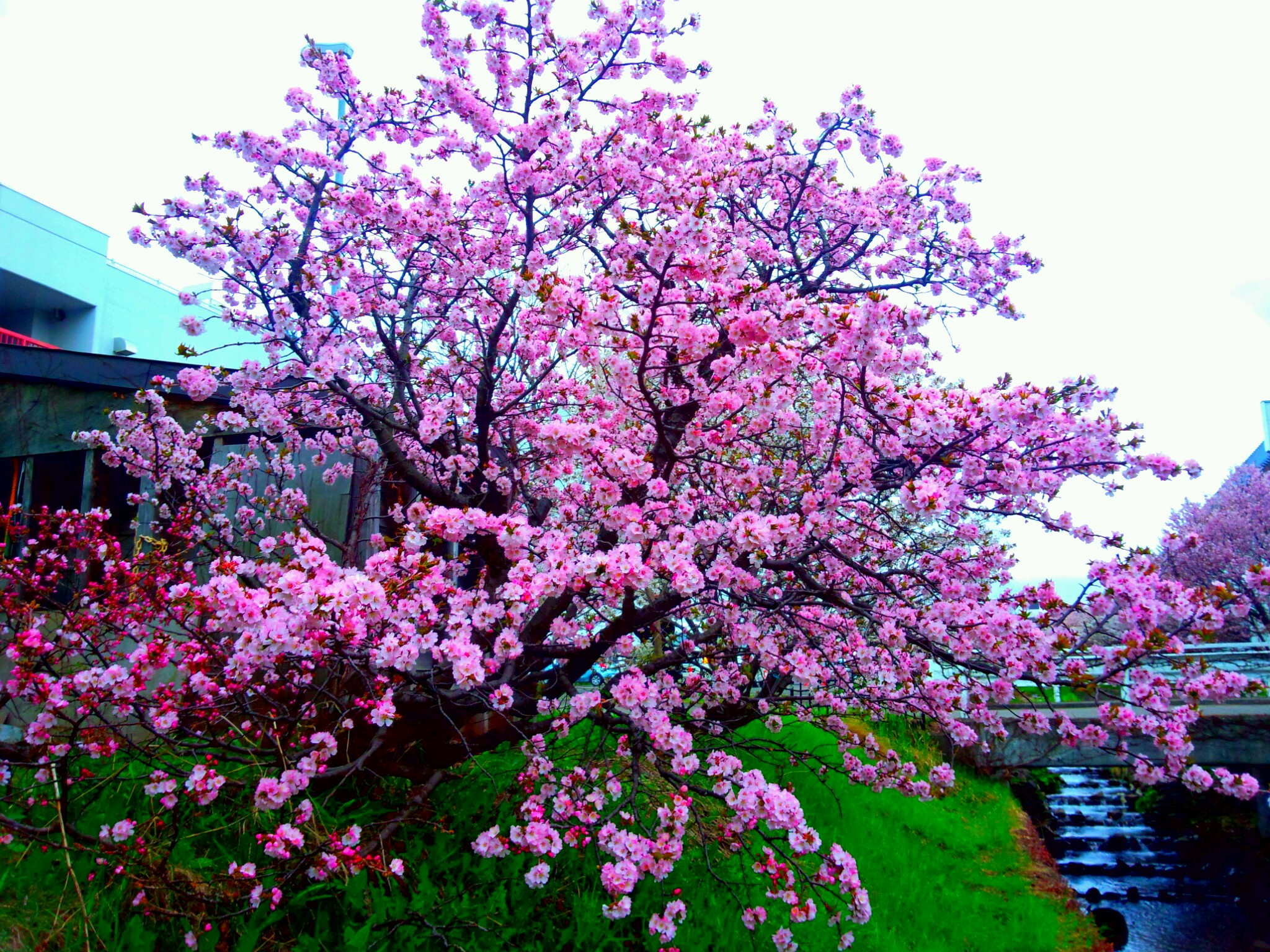 千島桜の樹